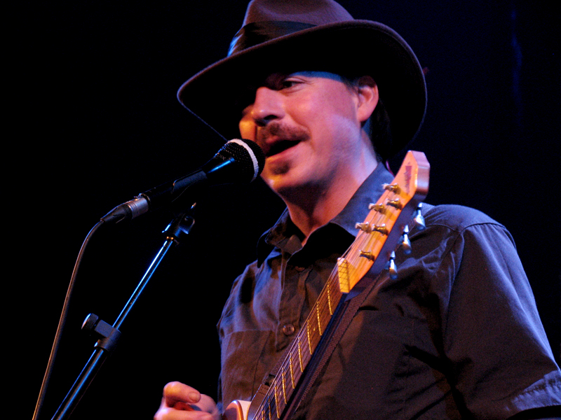 Festival Rocky Mountains, Apolo, Barcelona, octubre 2009